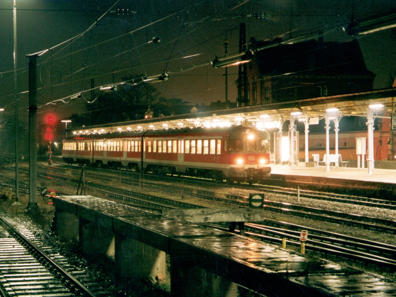 Wenige Tage vor dem Ende des 624 in Lippe steht dieses Exemplar in Detmold zur Abfahrt nach Bielefeld bereit.